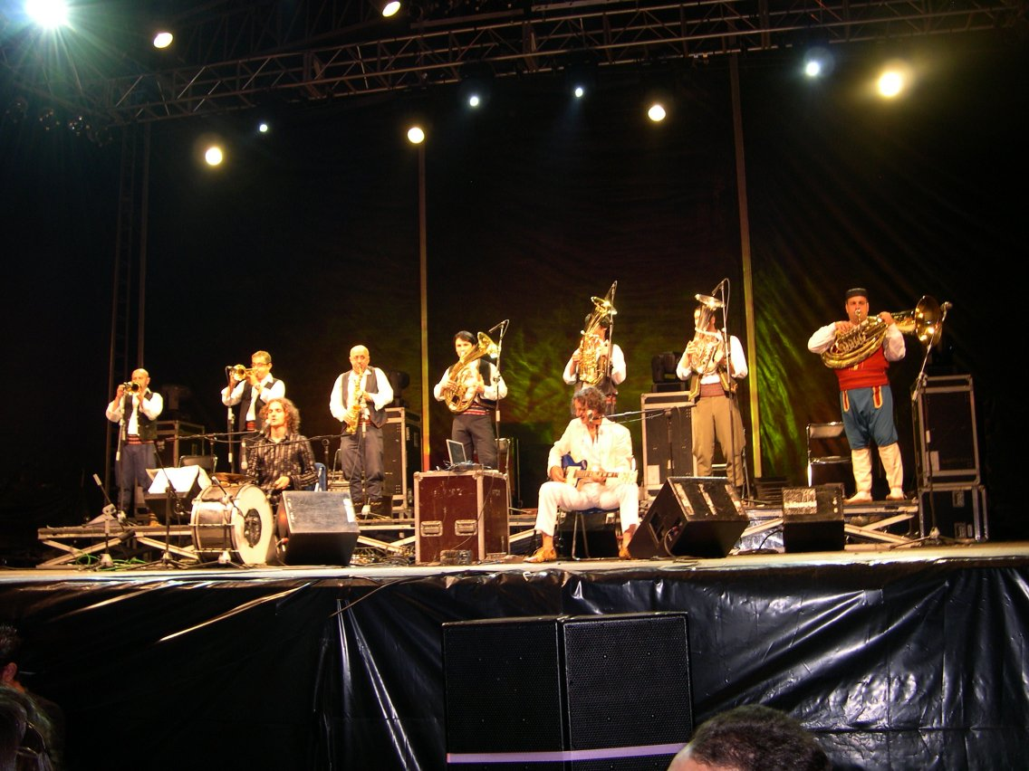 Goran_Bregovic_in_Xixón